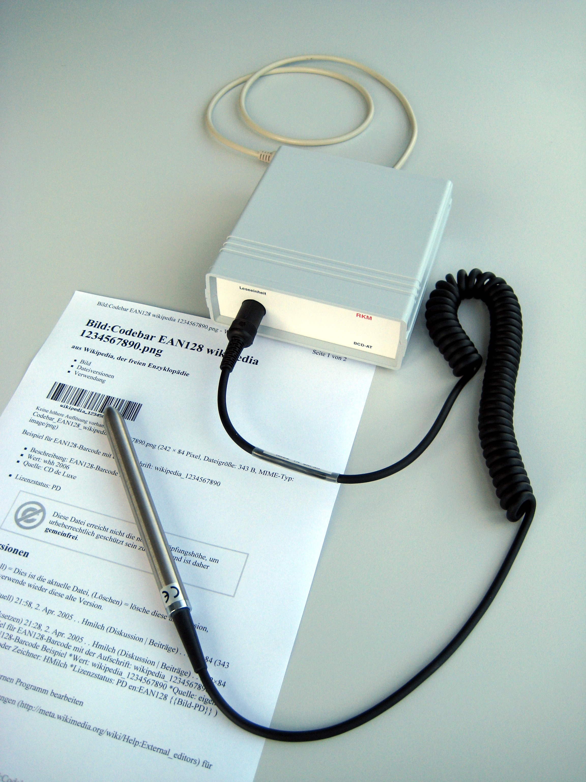 Ein Lesestift für den Barcode